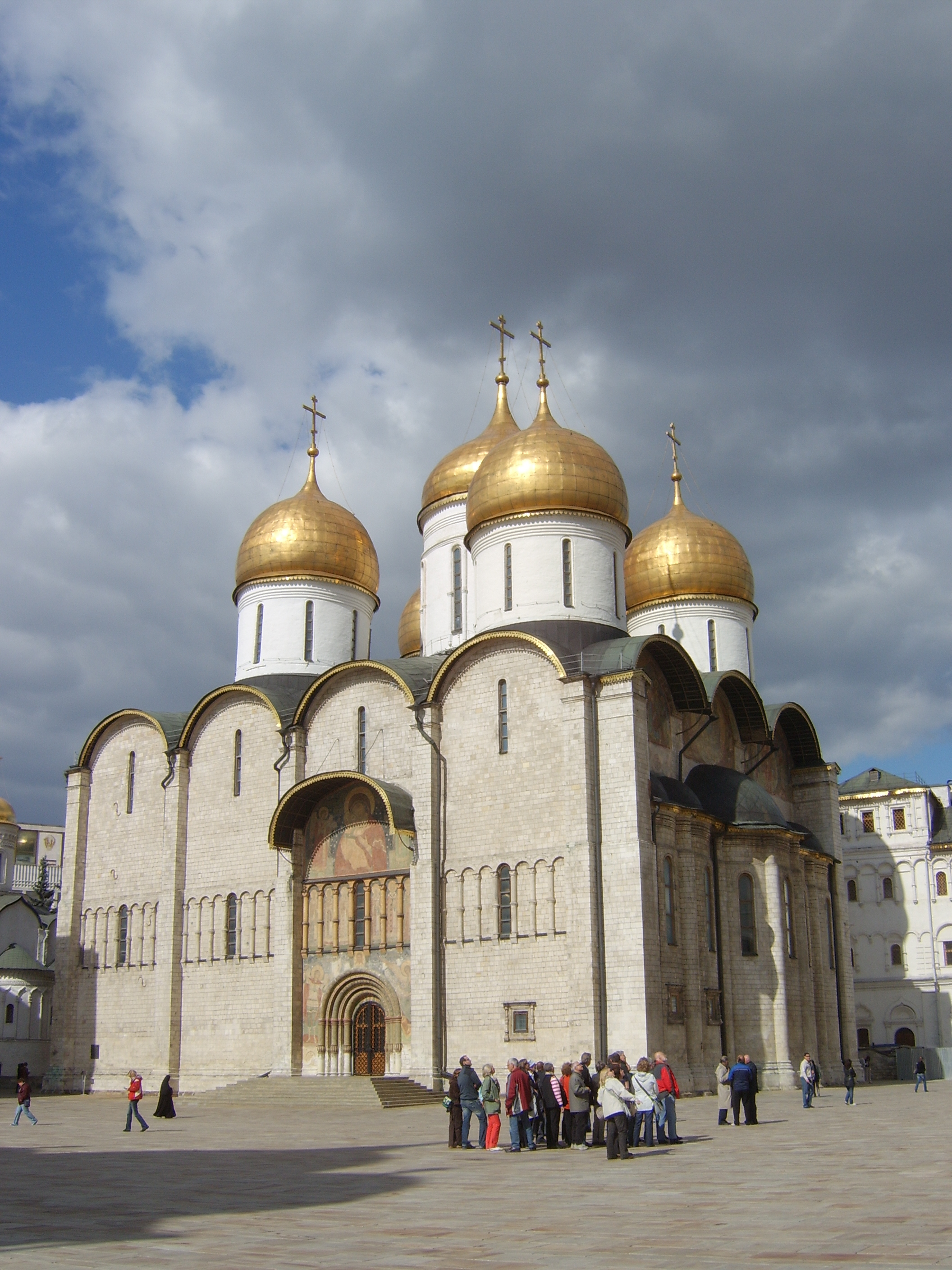 touristenfotos von Moskau